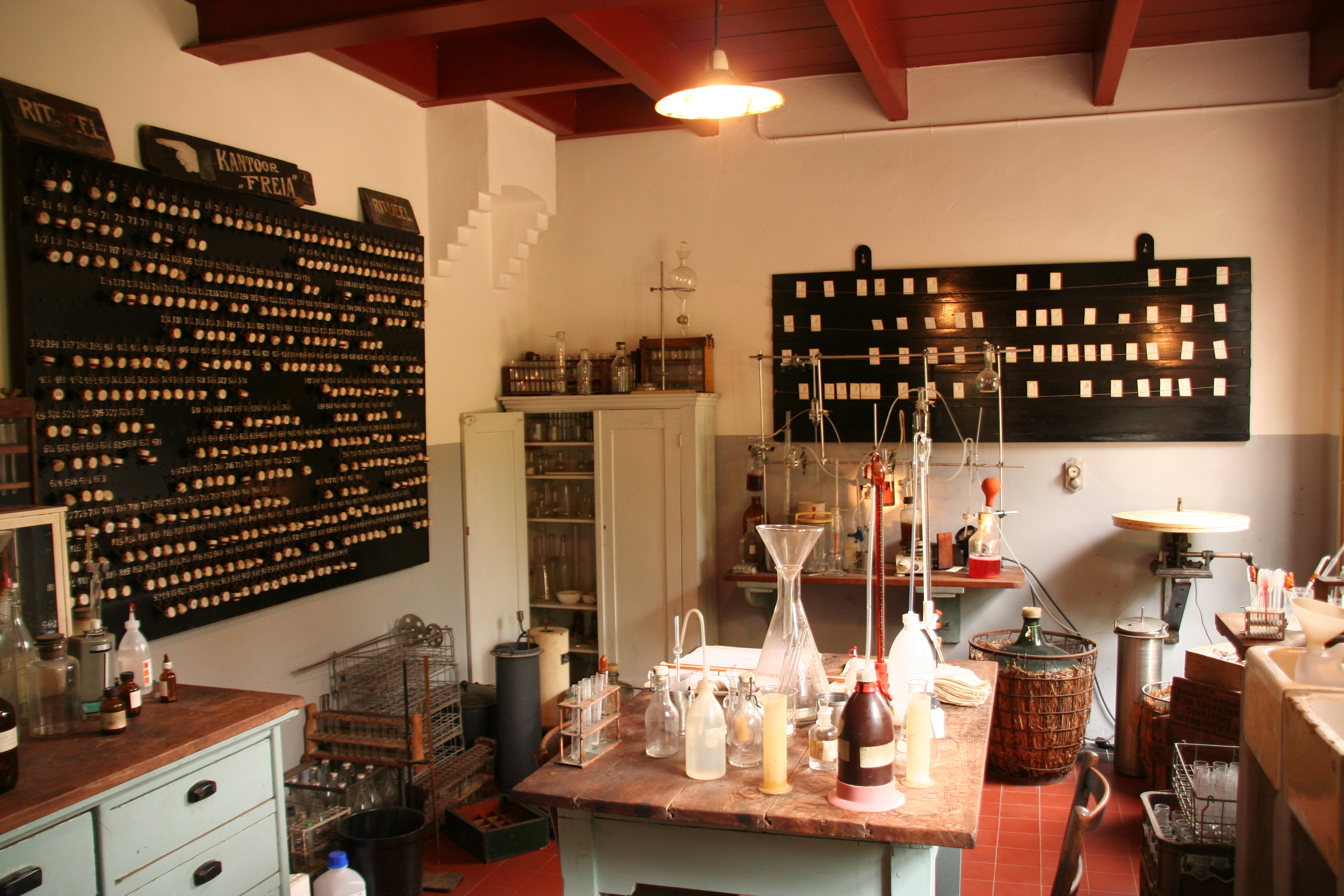 (Original text: Laboratorium in de zuivelfabriek van Freia in het Nederlands Openluchtmuseum te Arnhem.)